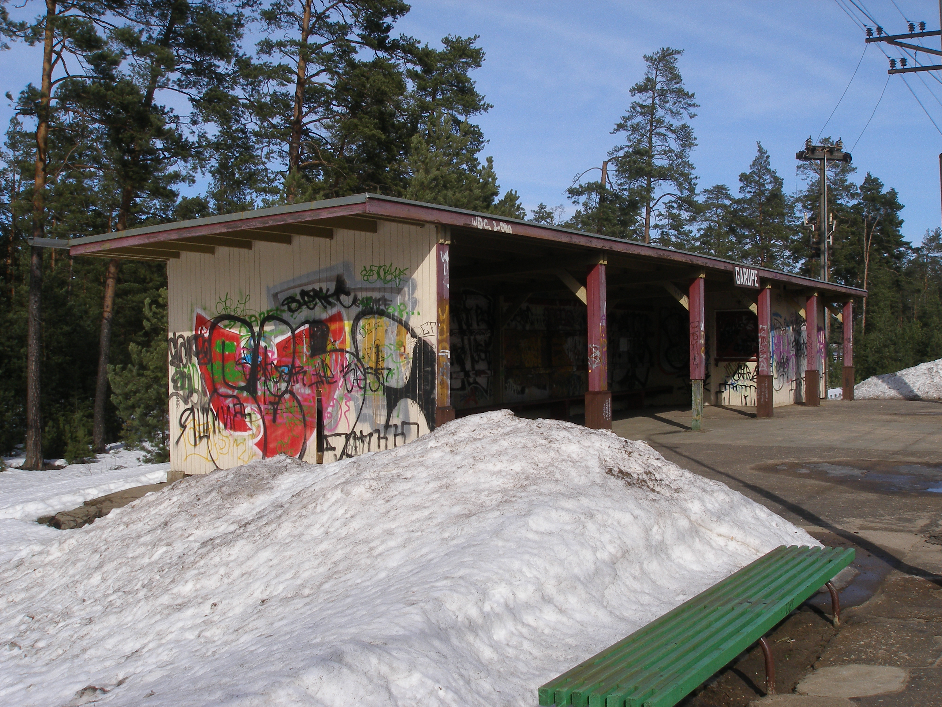 Пассажирский павильон остановочного пункта Гарупе. Снято 20 марта 2010 года.